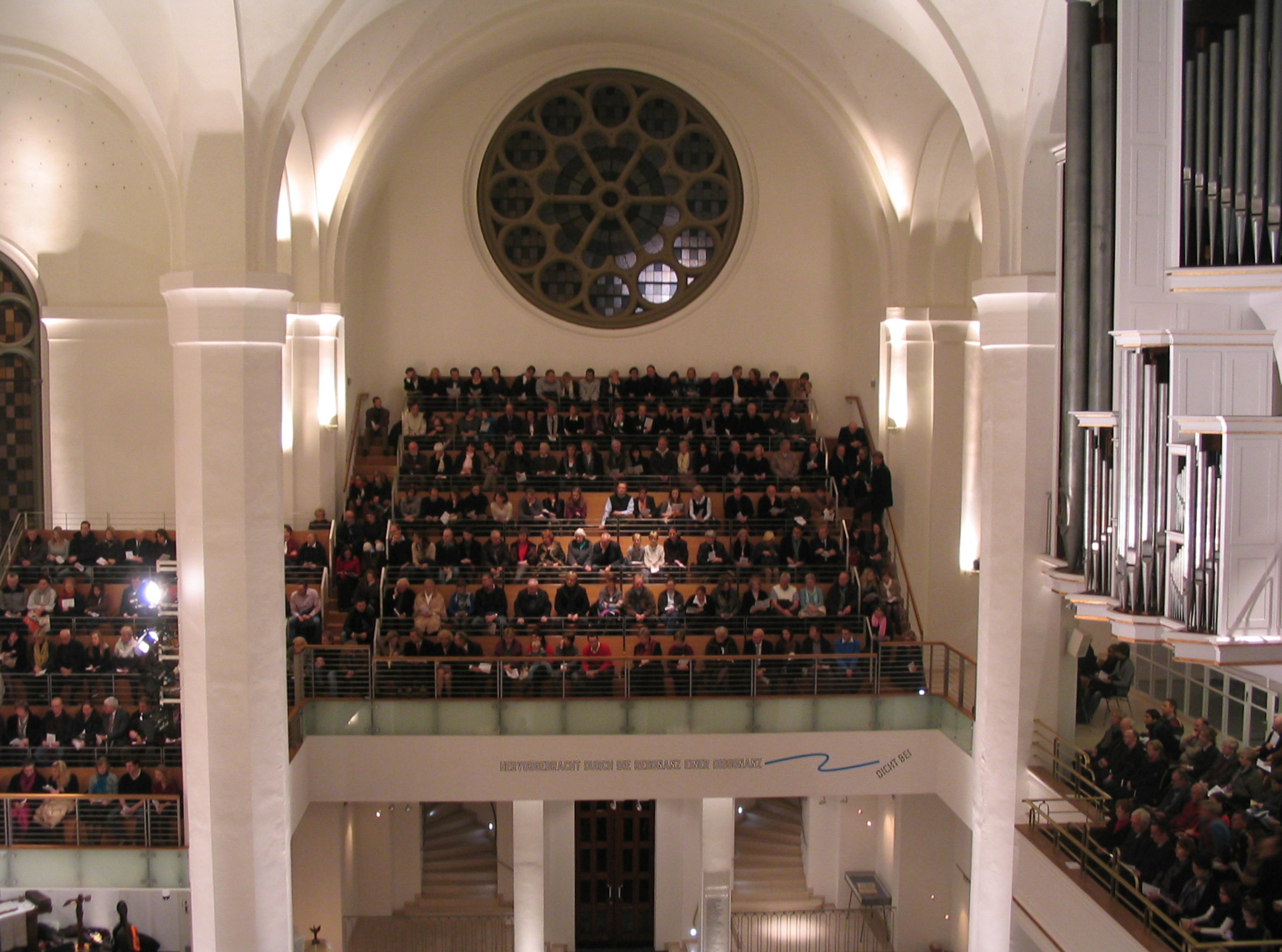 Johanneskirche Düsseldorf, Heiligabend 2011, 18 Uhr Gottesdienst.